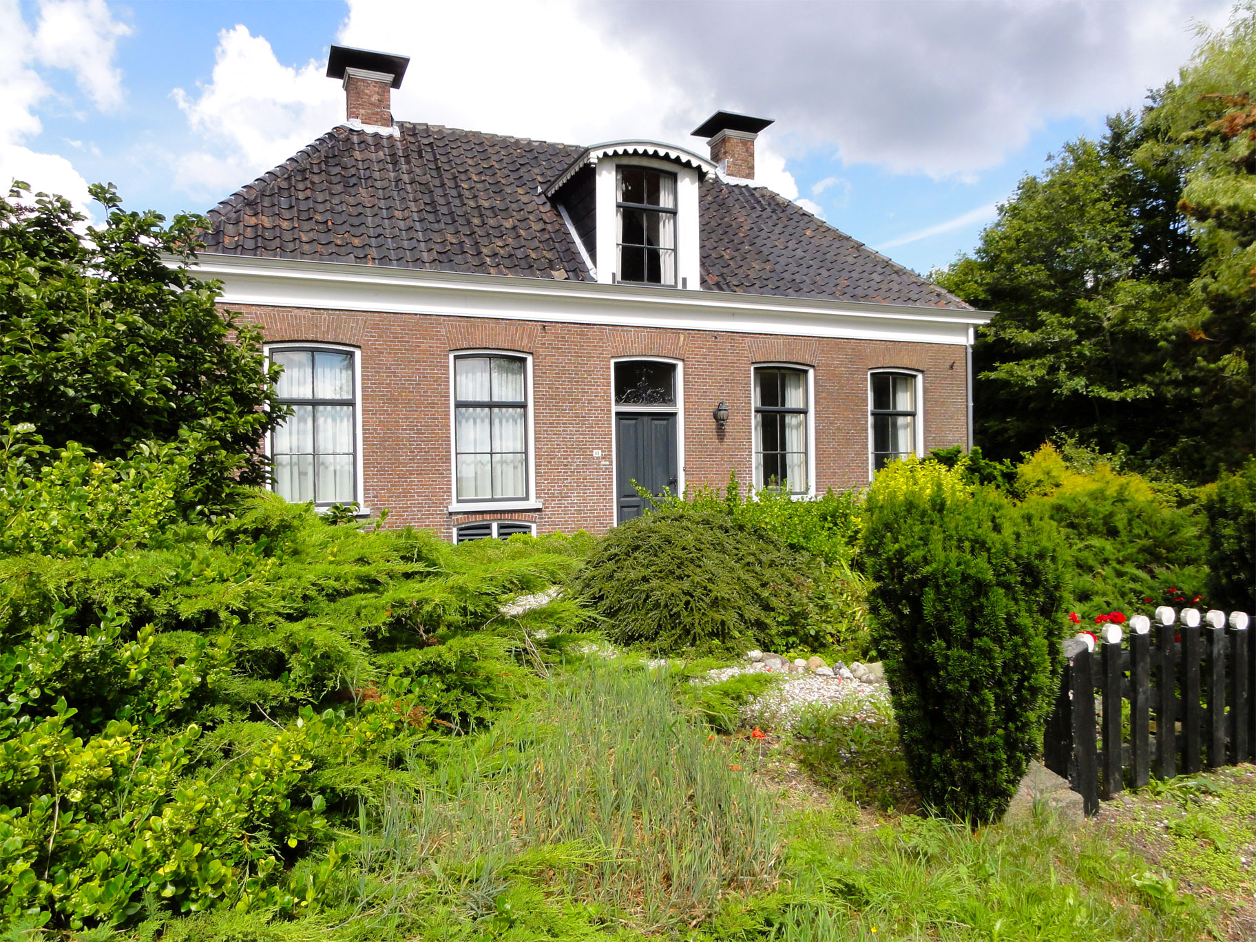 Boerderij Beetsterweg 13 te Beetsterzwaag